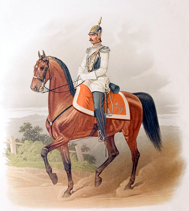 Штаб-офицер Кирасирского Её Императорского Высочества Великой Княгини Марии Николаевны полка. (В парадной форме.) 15 Марта 1855.